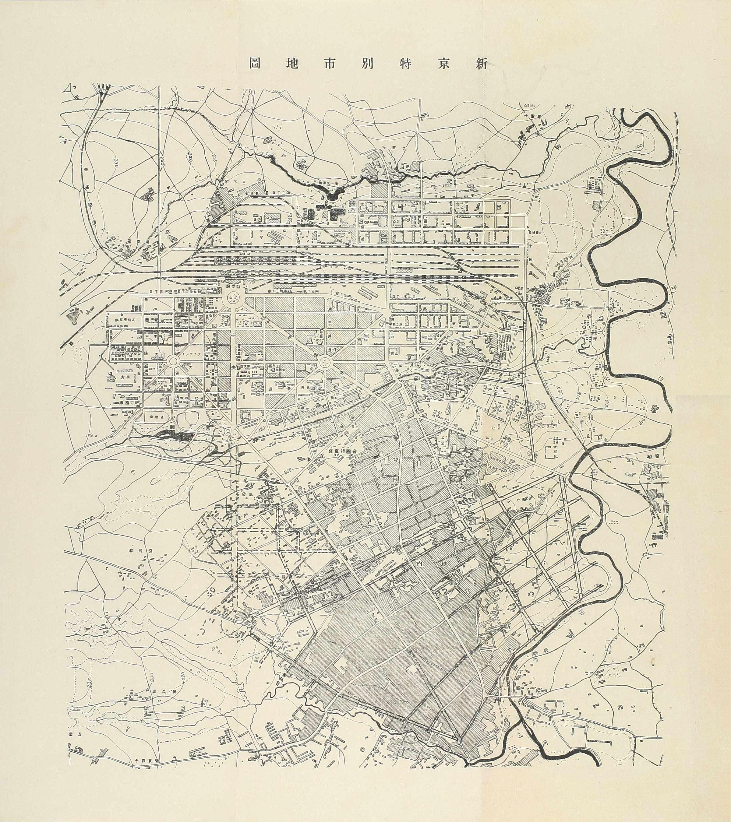 新京特別市公署『新京案内』に付属する、1933年（大同2年）当時の新京特別市地図。